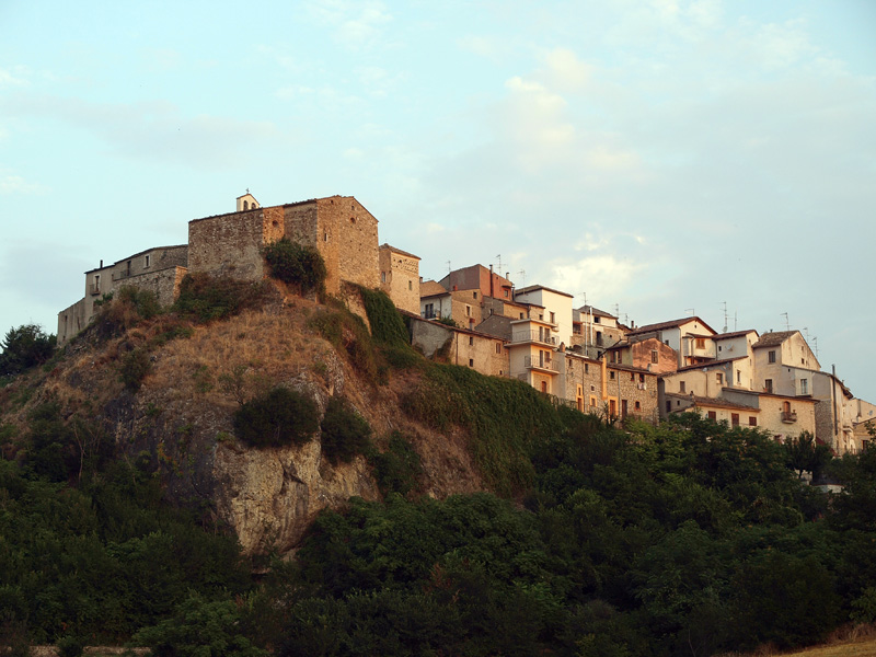 Pietrelcina - Centro Storico - Veduta del "Morgione"